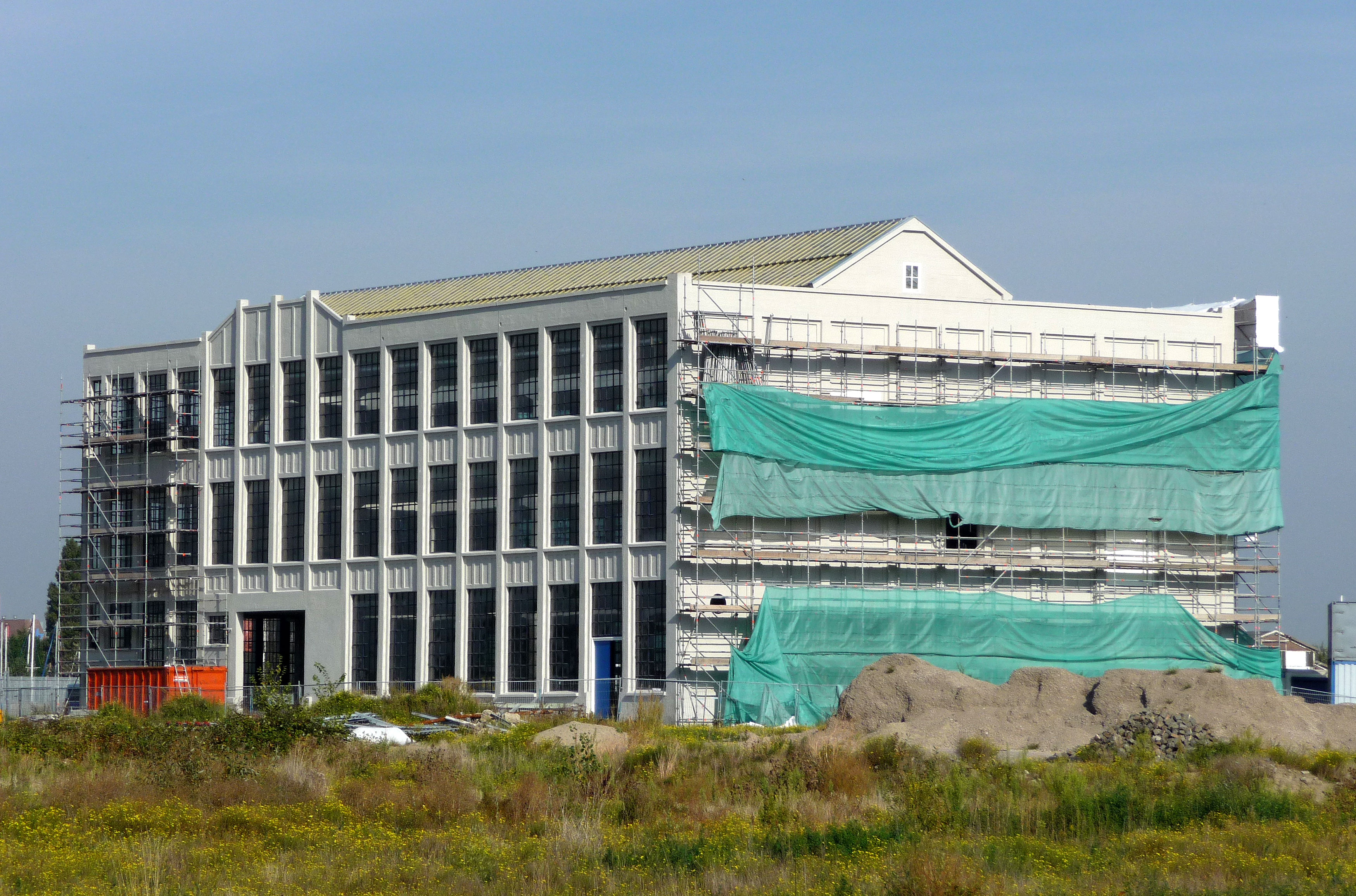 Timmerfabriek van de Koninklijke Maatschappij De Schelde (KMS) aan de Koningsweg te Vlissingen (1915)